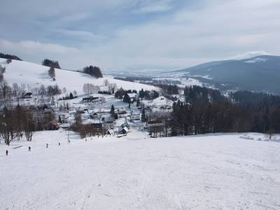 Petrovičky